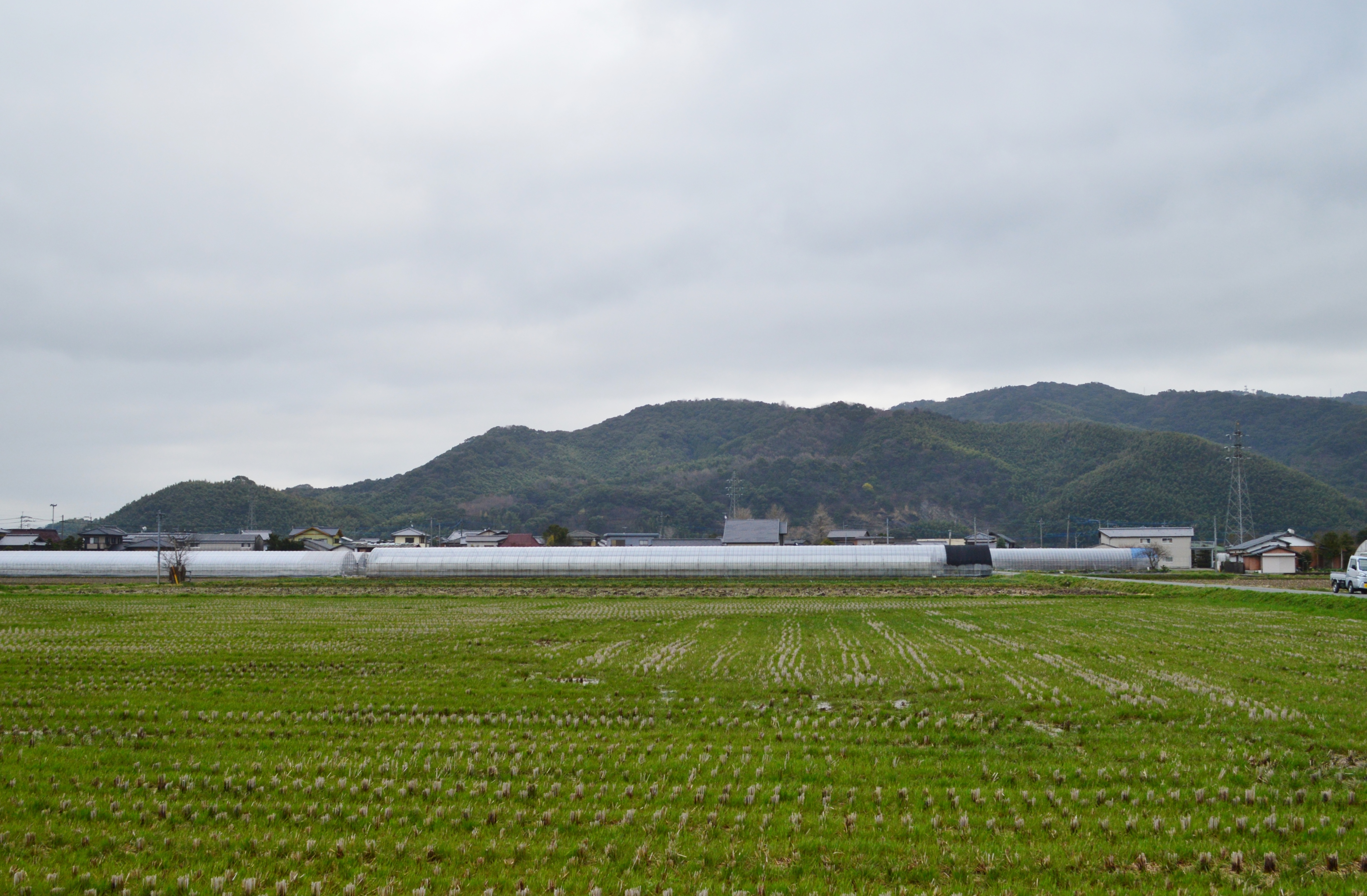 女山神籠石 遠景